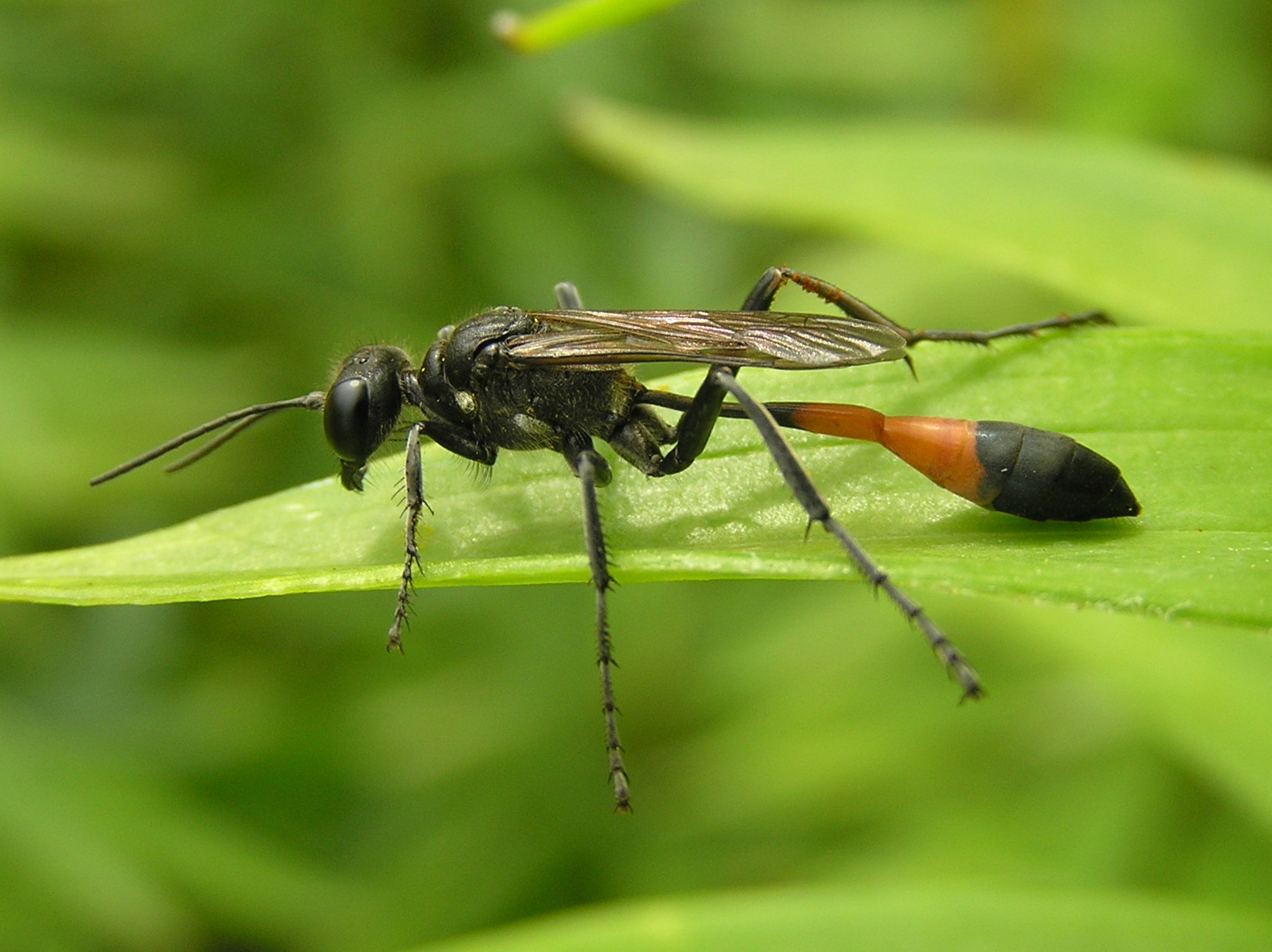 Ammophila sabulosa, Szczerklina piaskowa, Brok, Polska